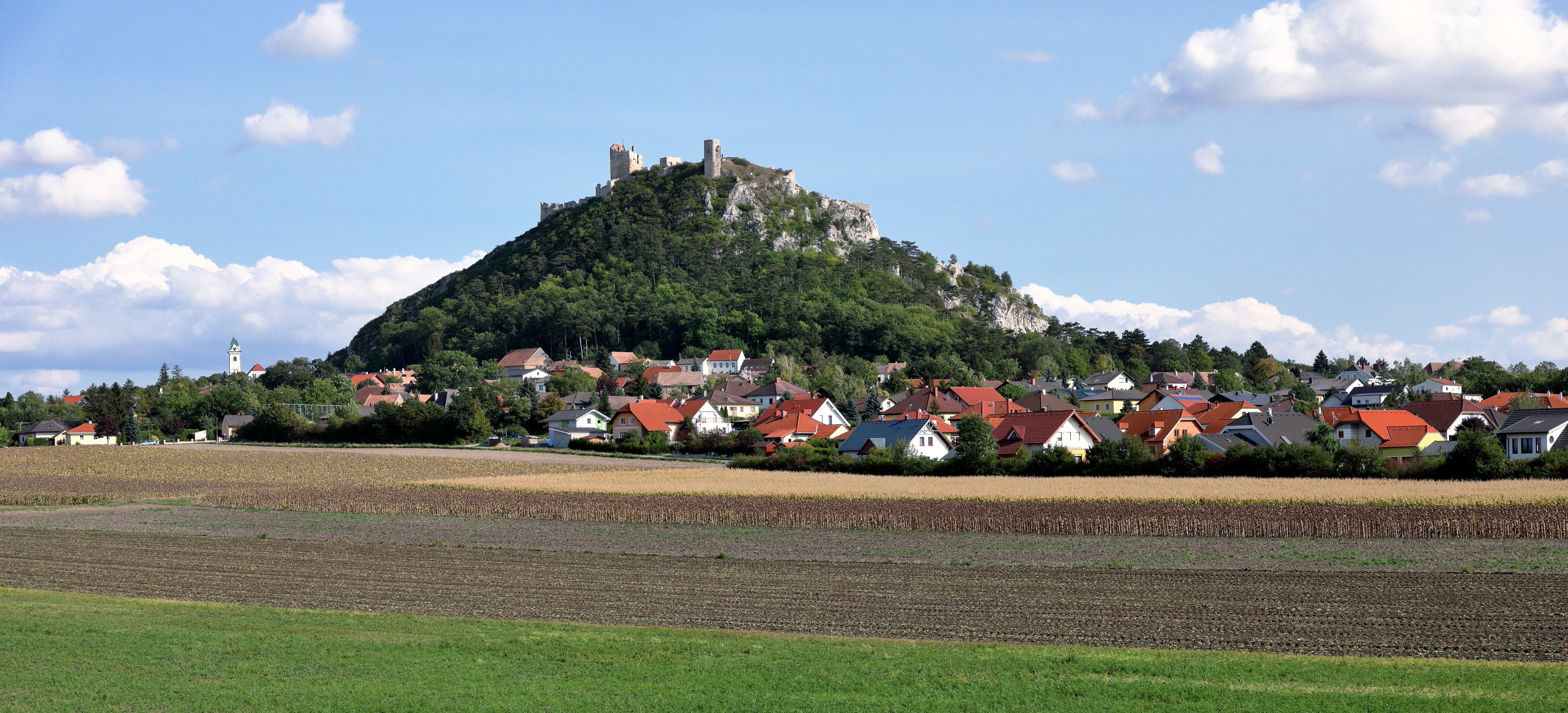 Nordwestansicht der niederösterreichischen Marktgemeinde Staatz. Im Zentrum der 332 m hohe Staatzer Berg, eine weithin sichtbare rund 100 Meter hohe Kalkklippe. Rund um dem Bergfuß das Dorf Staatz-Kautendorf mit der Pfarrkirche ganz links und auf dem Berg die Burgruine Staatz, eine ehemalige Burg, die am 24. April 1645 im Zuge des Dreißigjährigen Krieges von den Schweden zerstört wurde.